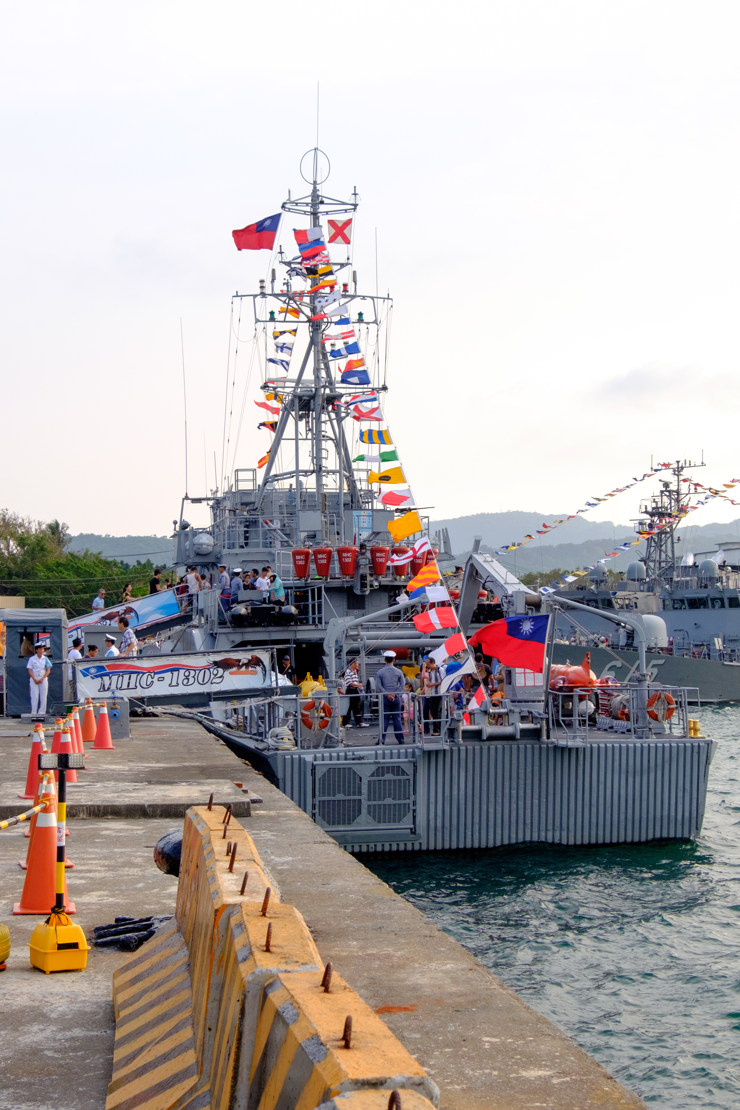 中文（台灣）: 2016年左營軍港營區開放活動下午，停泊東七號碼頭的永豐級獵雷艦永嘉（MHC-1302）艦尾。